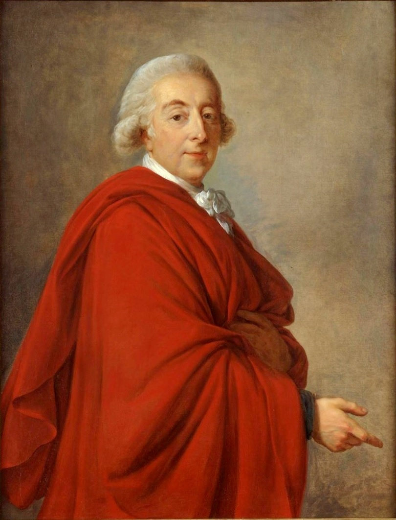 Portrait of Adam Kazimierz Czartoryski (1734-1823)